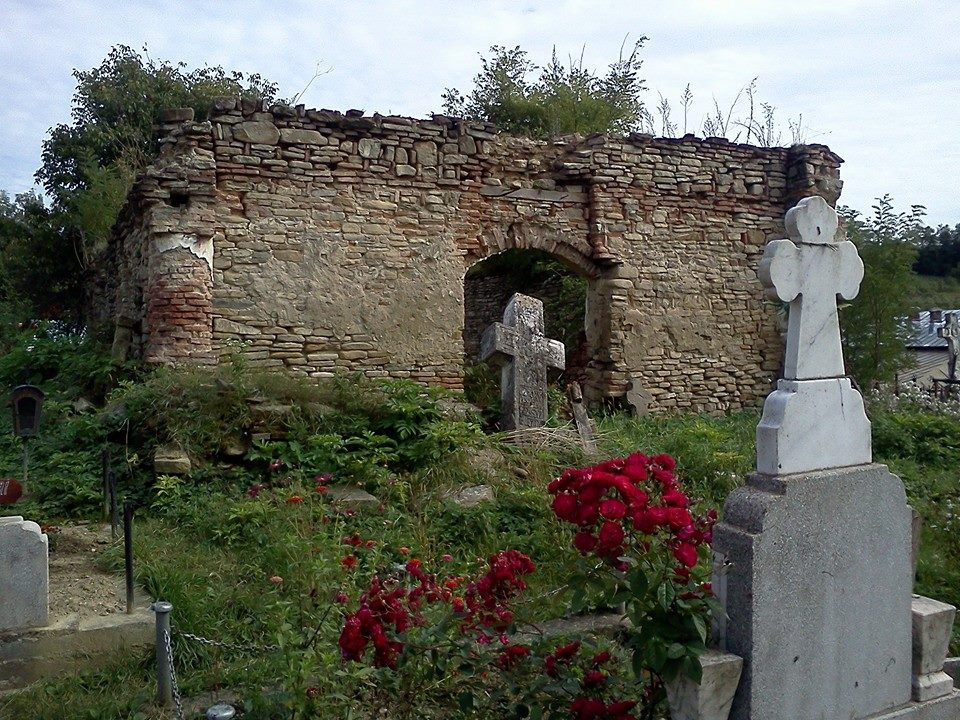 Ruinele bisericii „Sf. Dumitru”, „Sf. Paraschiva”